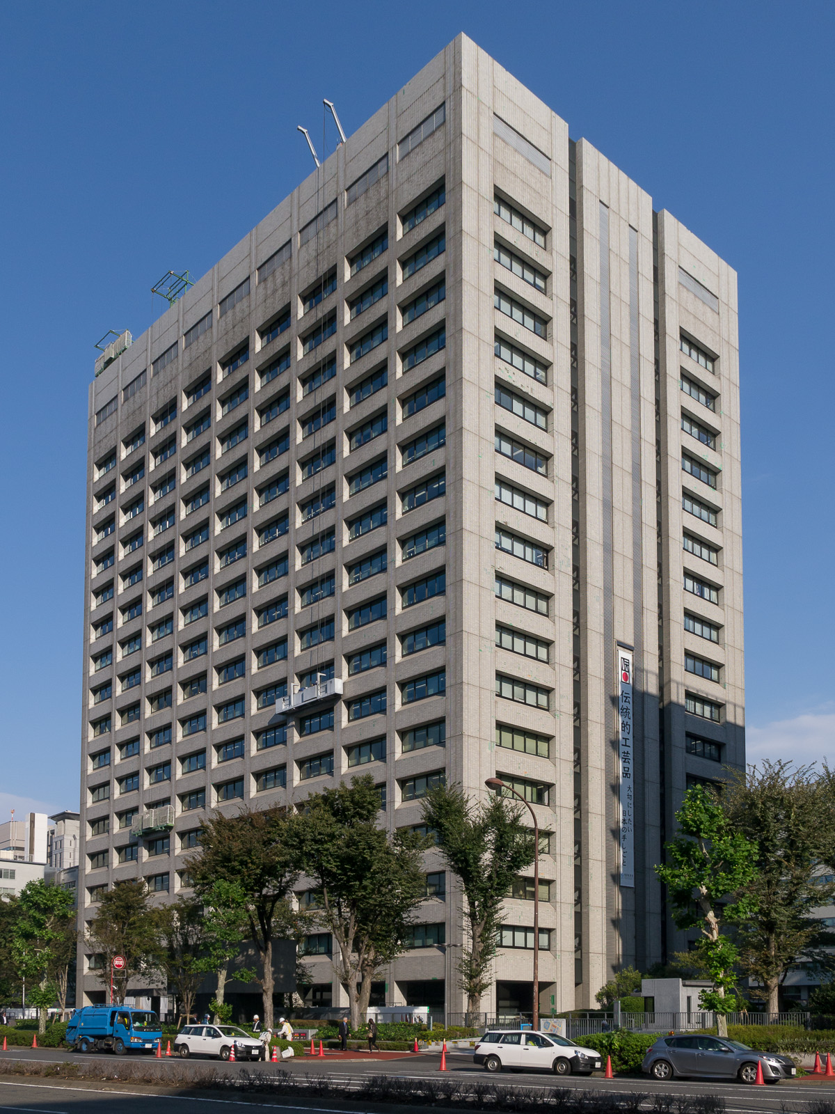 経済産業省本館、東京都千代田区霞が関。